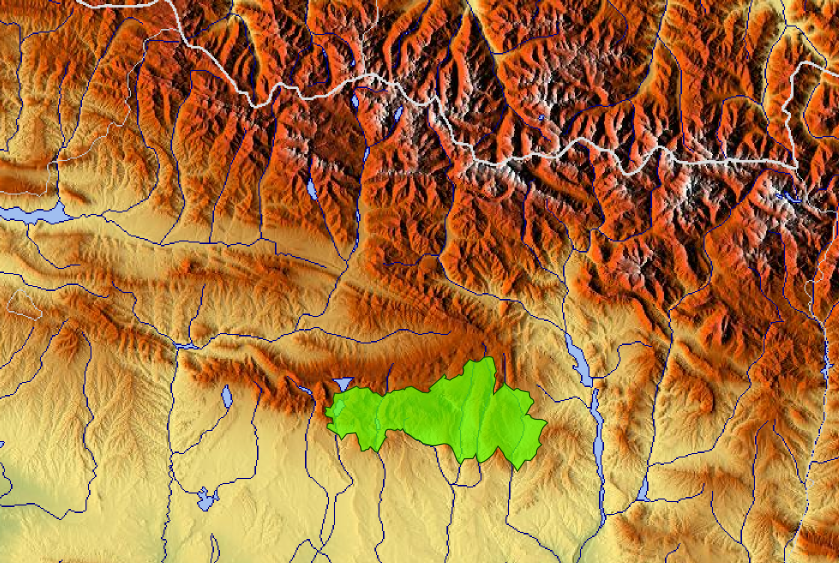 Situazión Parque Natural de la Sierra y Cañones de Guara